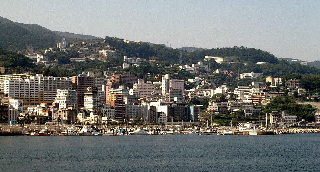 熱海 2004年8月13日投稿者が撮影